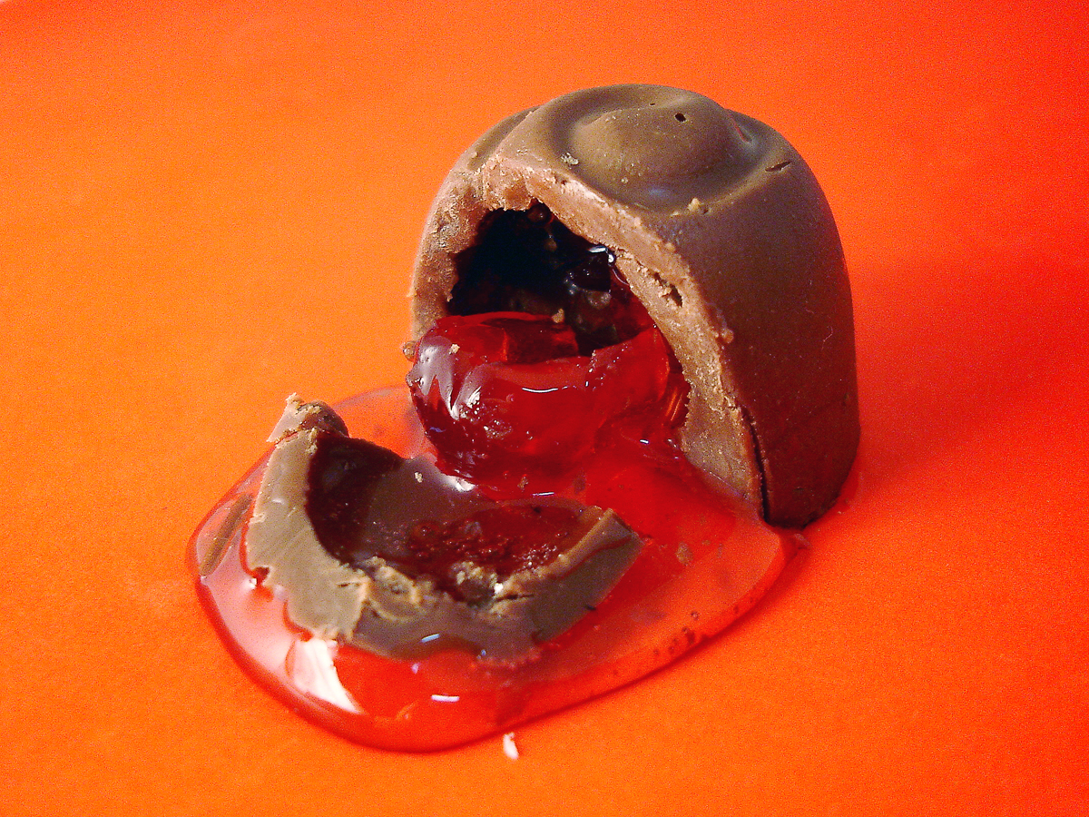 Foto que eu fiz para uma campanha publicitária para o mês dos namorados.